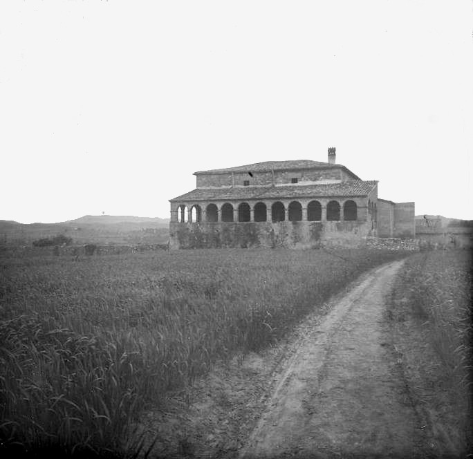 Casa anomenada la Torre de la Llebre. Josep Salvany i Blanch (1919)